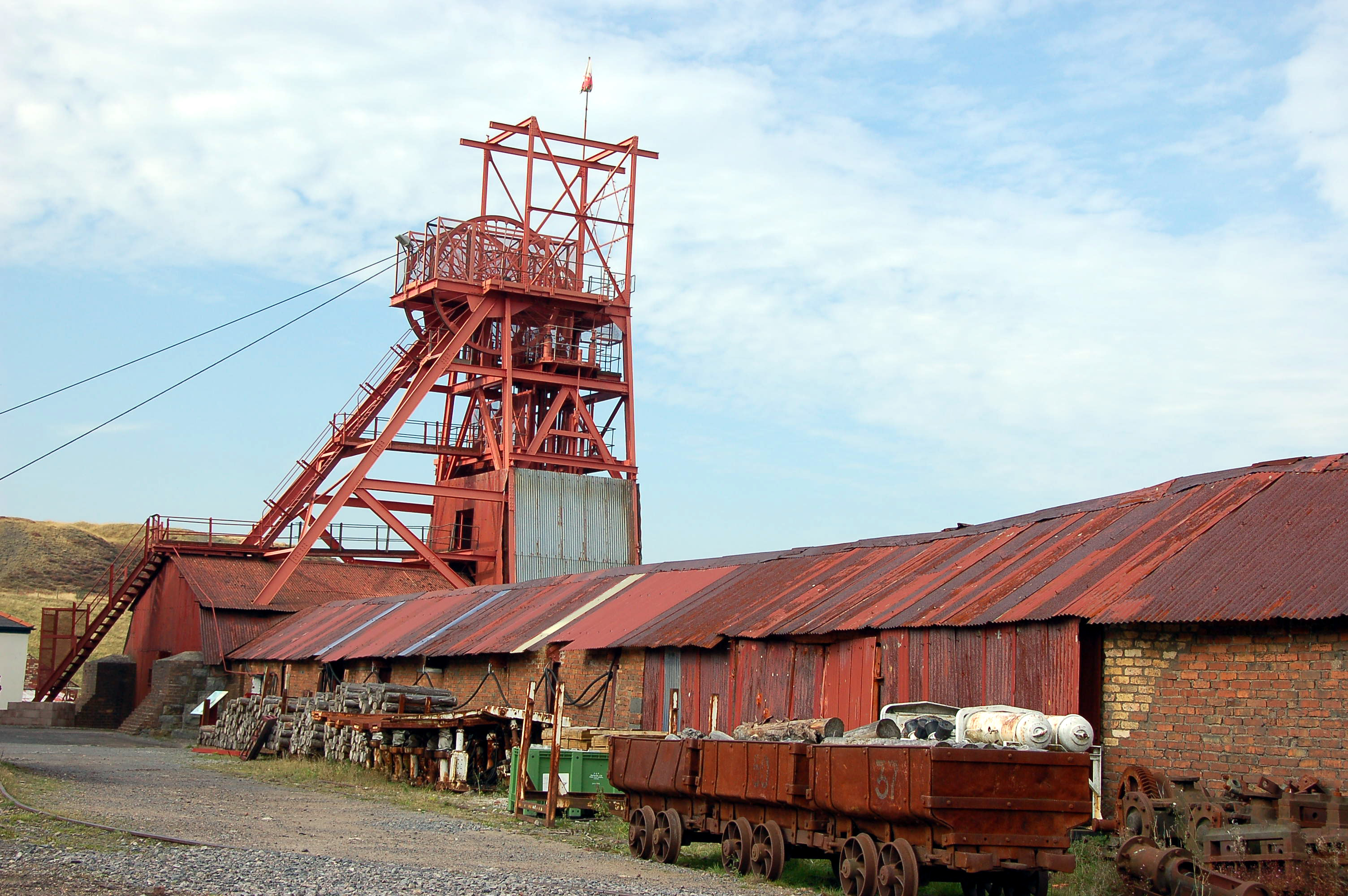 Big Pit, Blaenavon, Wales. September 2006